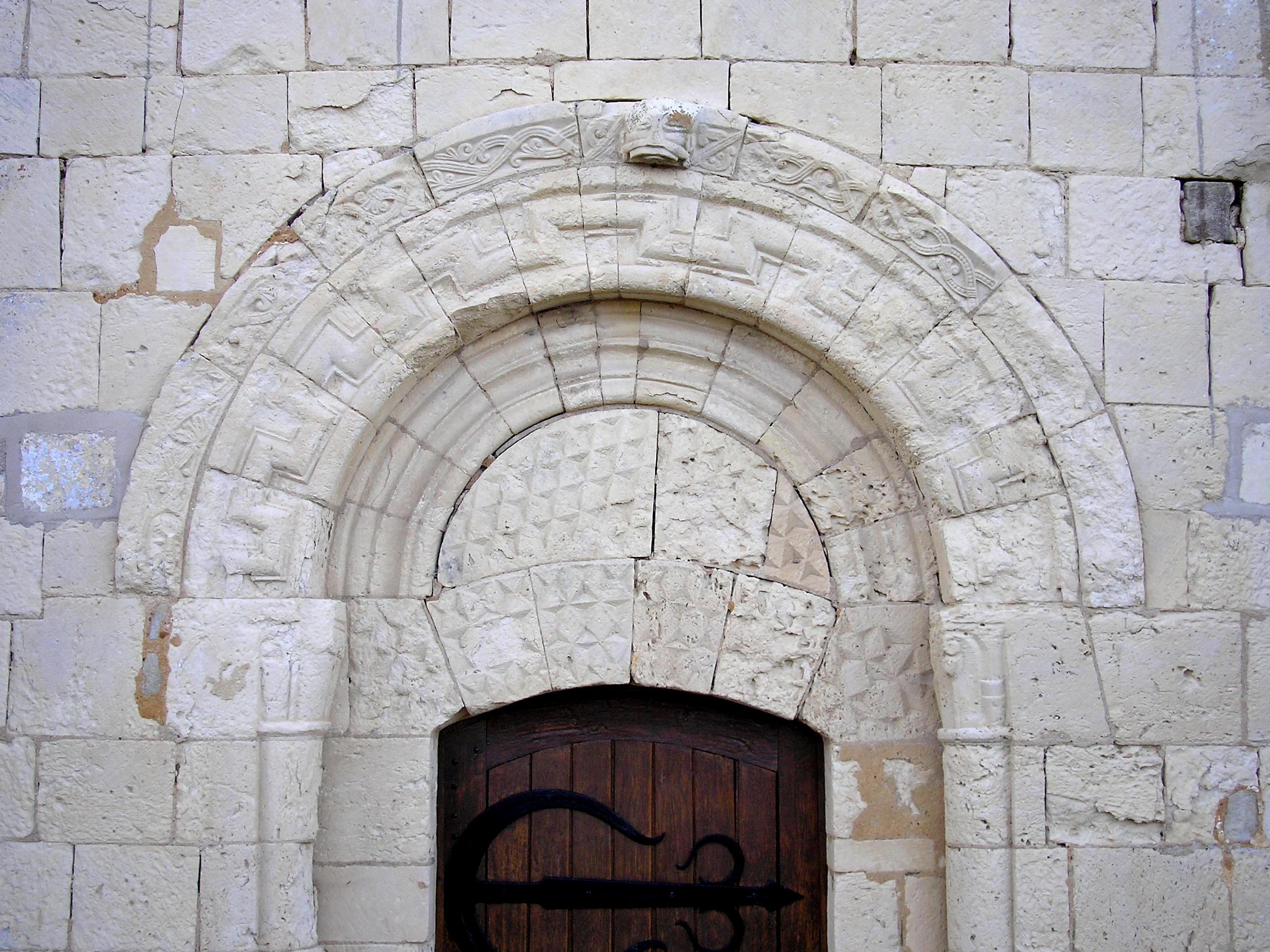 Tessel (Normandie, France). Tympan du portail sud de l'église Saint-Germain.